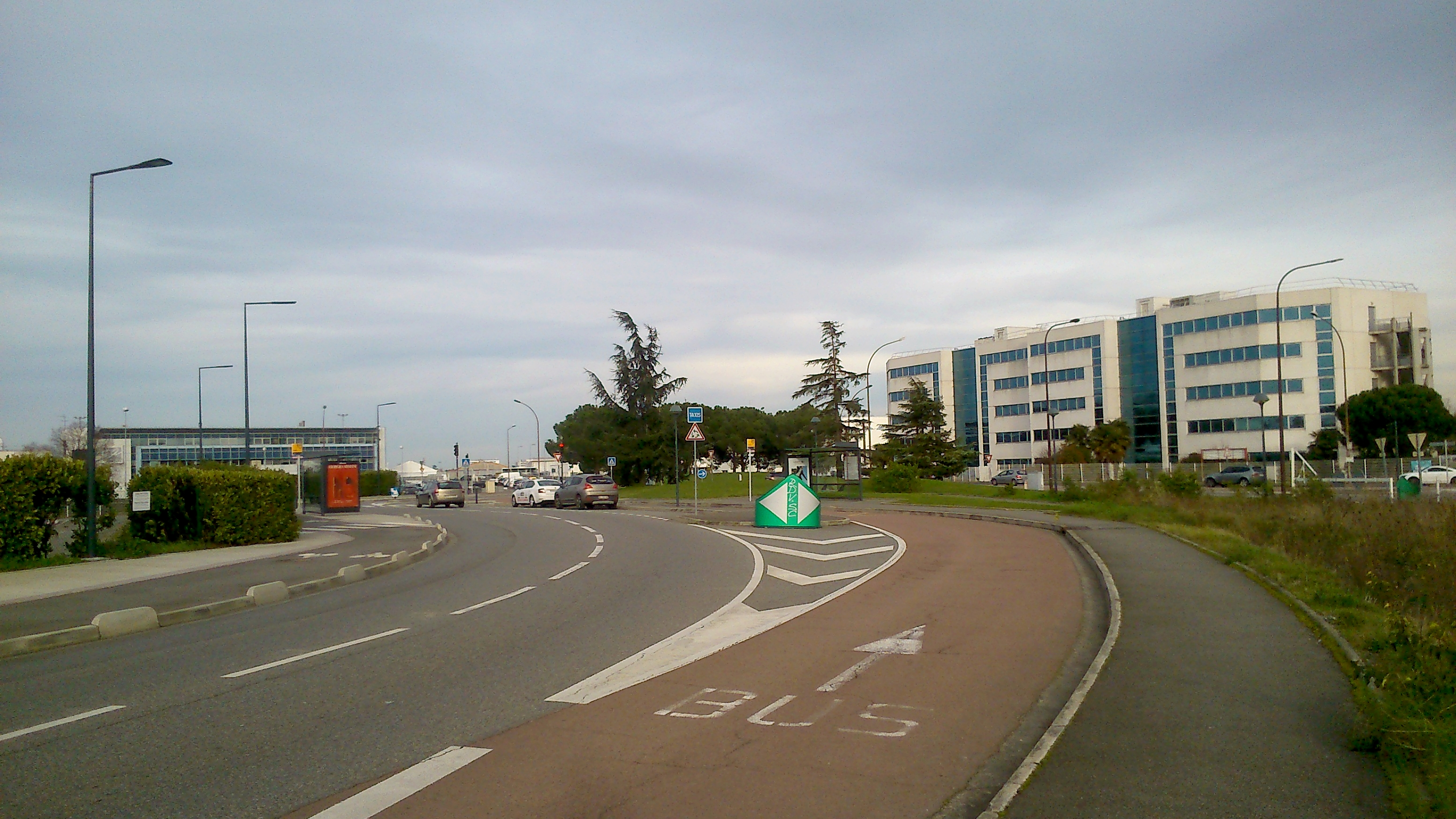 La station de bus Crabe à Saint-Martin-du-Touch, à côté de l'échangeur du même nom et emplacement de la future station de métro de la ligne TAE.